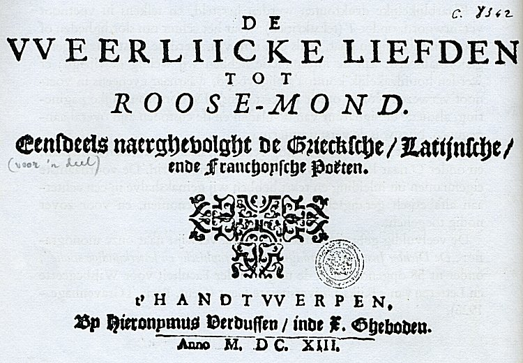 Page de titre des "Weerliicke Liefden tot Roose-mond".(Les Amours profanes de Roose-mond), recueil de Justus de Harduwijn, publié anonymement en 1613. Fac-similé de la bibliothèque universitaire de Gand (G8342), in : Justus de Harduwijn, "De weerliicke Liefden tot Roose-mond 1613", éd. de O. Dambre, 2e impr., Culemborg, Tjeenk Willink/Noorduijn, 1972, p. 62.